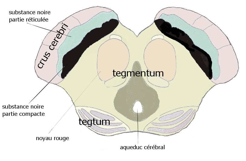 mésencéphale, coupe axiale, d'après D. Hasboun Les noyaux gris centraux (poly) midbrain